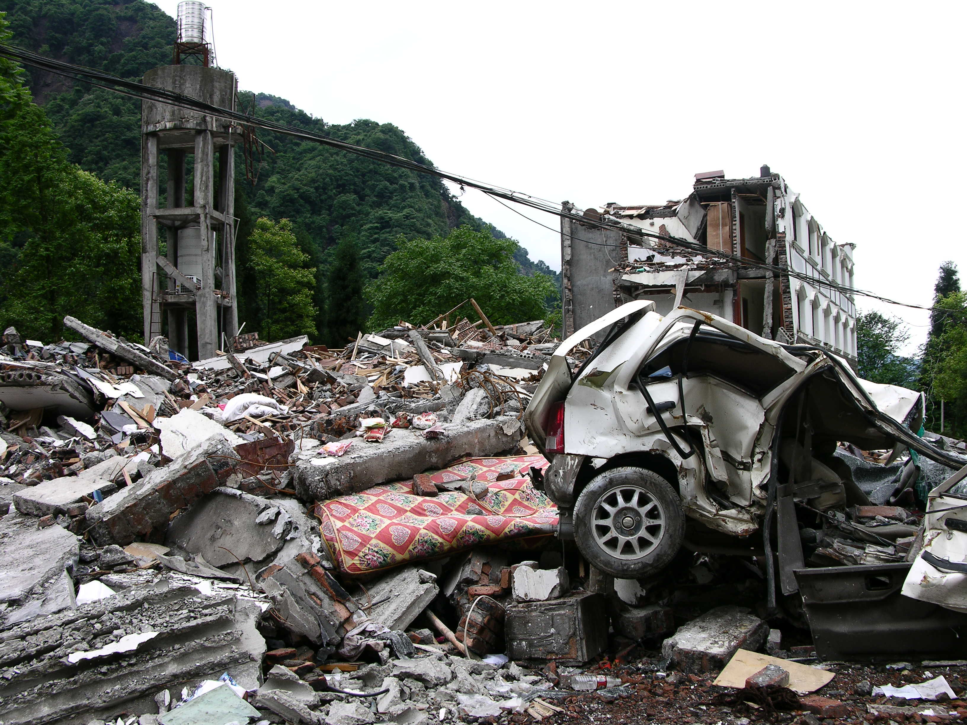 A6 银厂沟 liuzusai